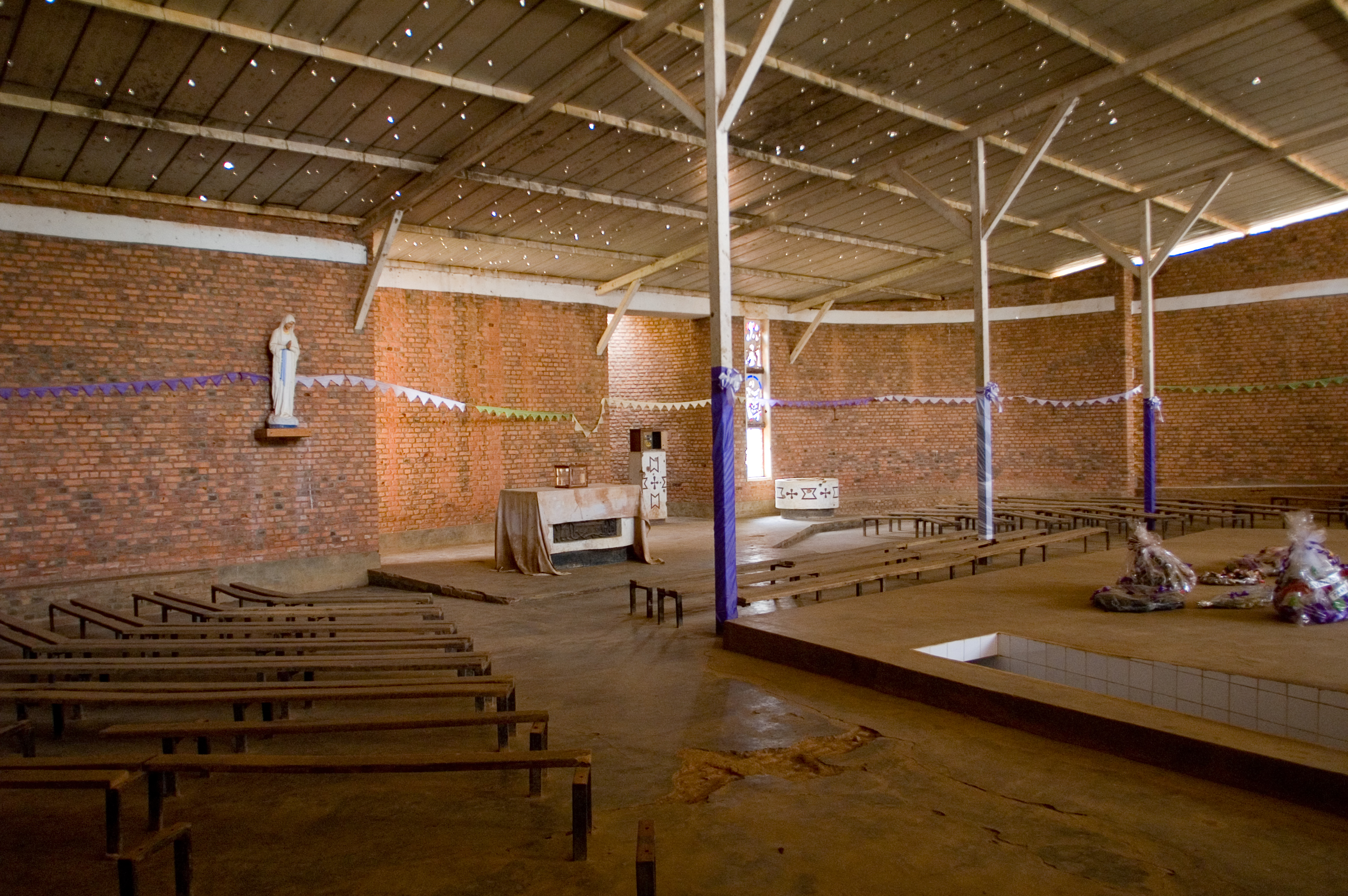 Nyamata Memorial Site.